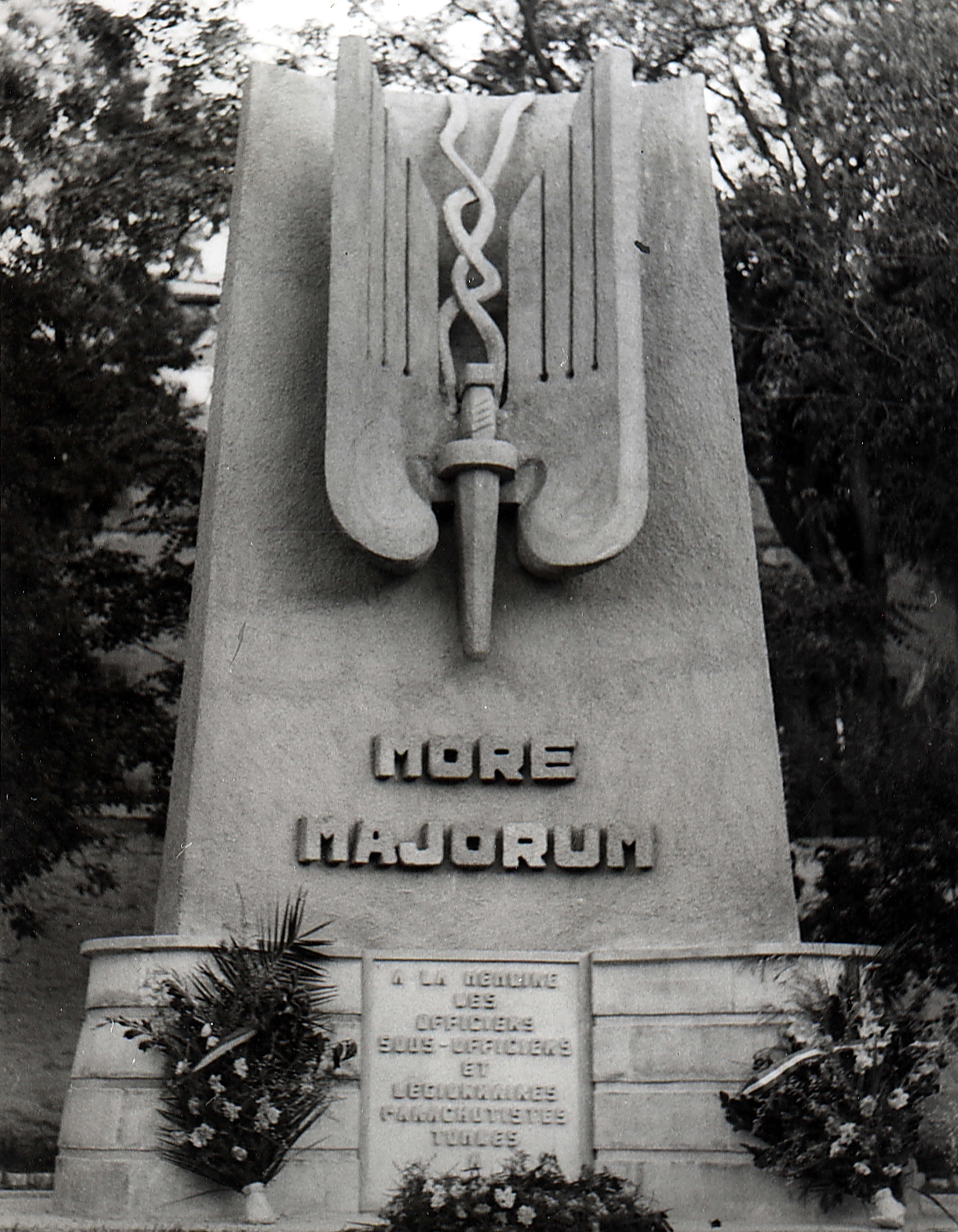 Monument aux morts des légionnaires parachutistes - (cette photo a été prises avant le transfert du monument d'Algérie en Corse